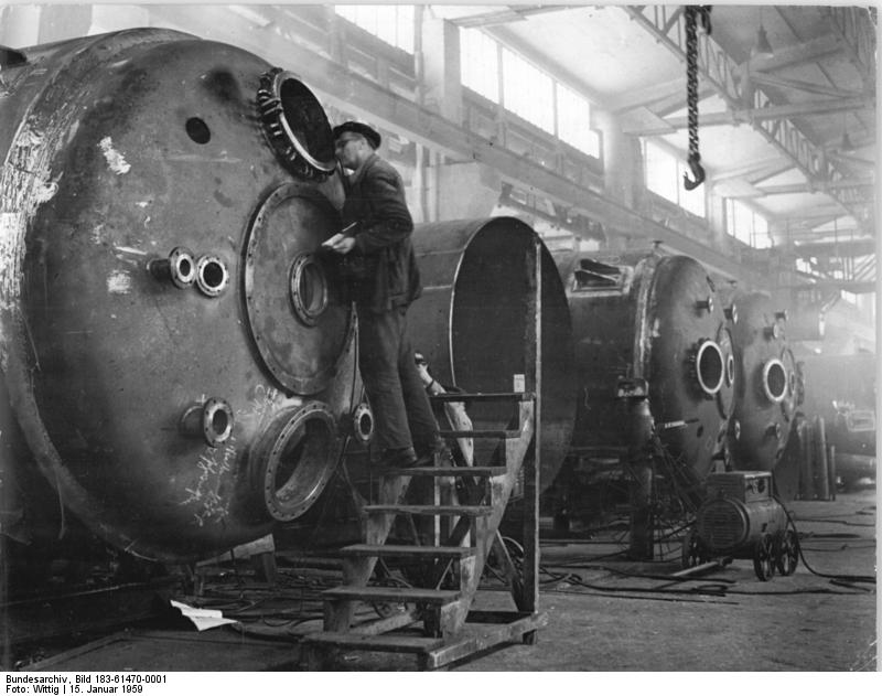 Zentralbild-Wittig Vgt-Ho. 15.1.1959 Im VEB Chema Rudisleben Der VEB Chemische Maschinenbauwerke Rudisleben im Bezirk Erfurt ist einer der wichtigsten Betriebe dieser Art. Er fertigt Chemieausrüstungen für den Eigenbedarf der DDR, ausserdem exportiert er in die sozialistischen Länder. Sauerstoffanlagen, Rührwerkskristallisatoren, Absetzer und Verdampfungsanlagen stehen ebenso auf dem Fertigungsprogramm wie Butterfertiger und Milchtanks. UBz: Blick in die Halle IV, in der zur Zeit Rührwerksbehälter mit einem Fassungsvermögen von 25 cbm u.a. für VEB BUNA gefertigt werden. Sie helfen, unser Chemieprogramm zu verwirklichen. Information added by Wikimedia users.